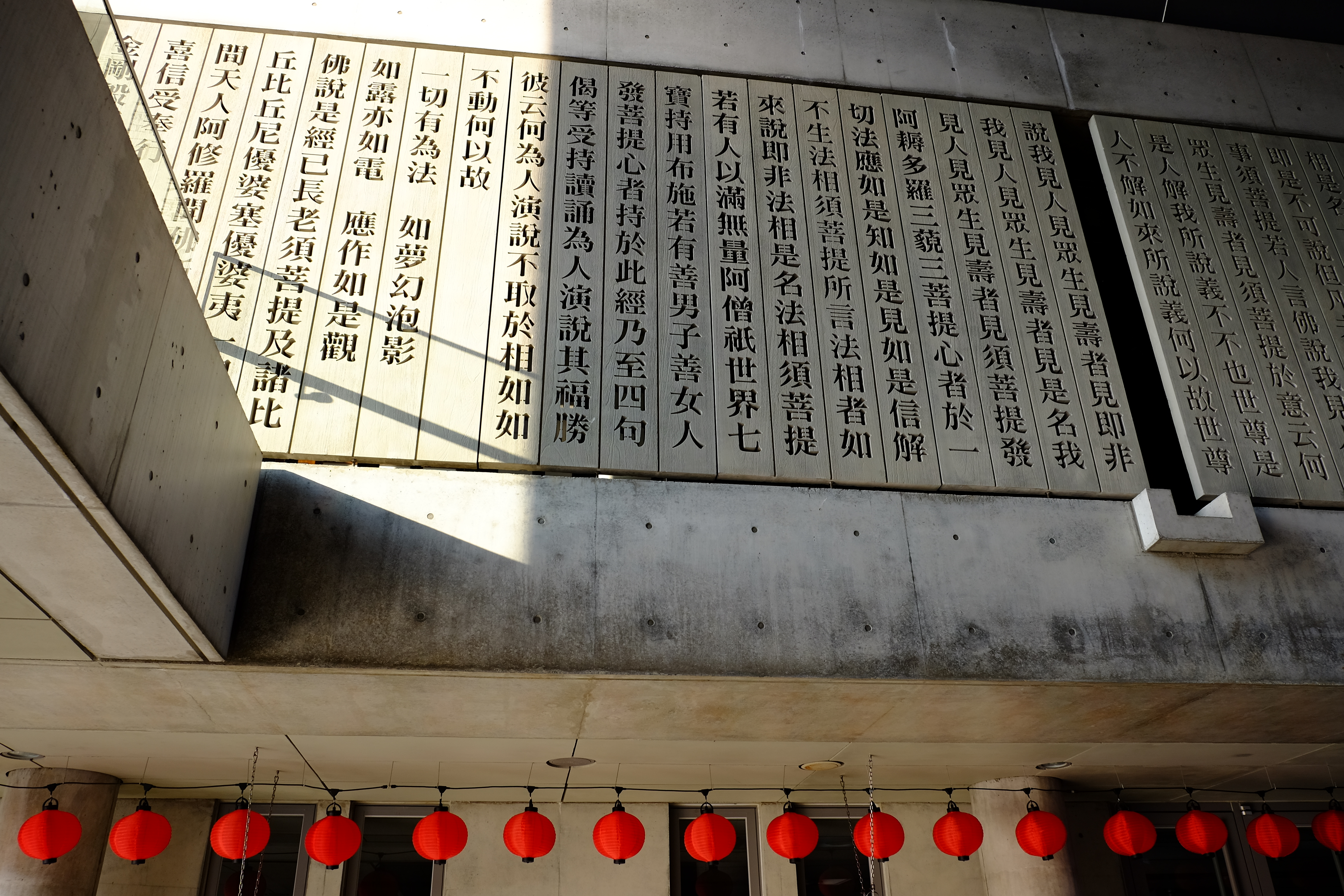 農禪寺水月道場